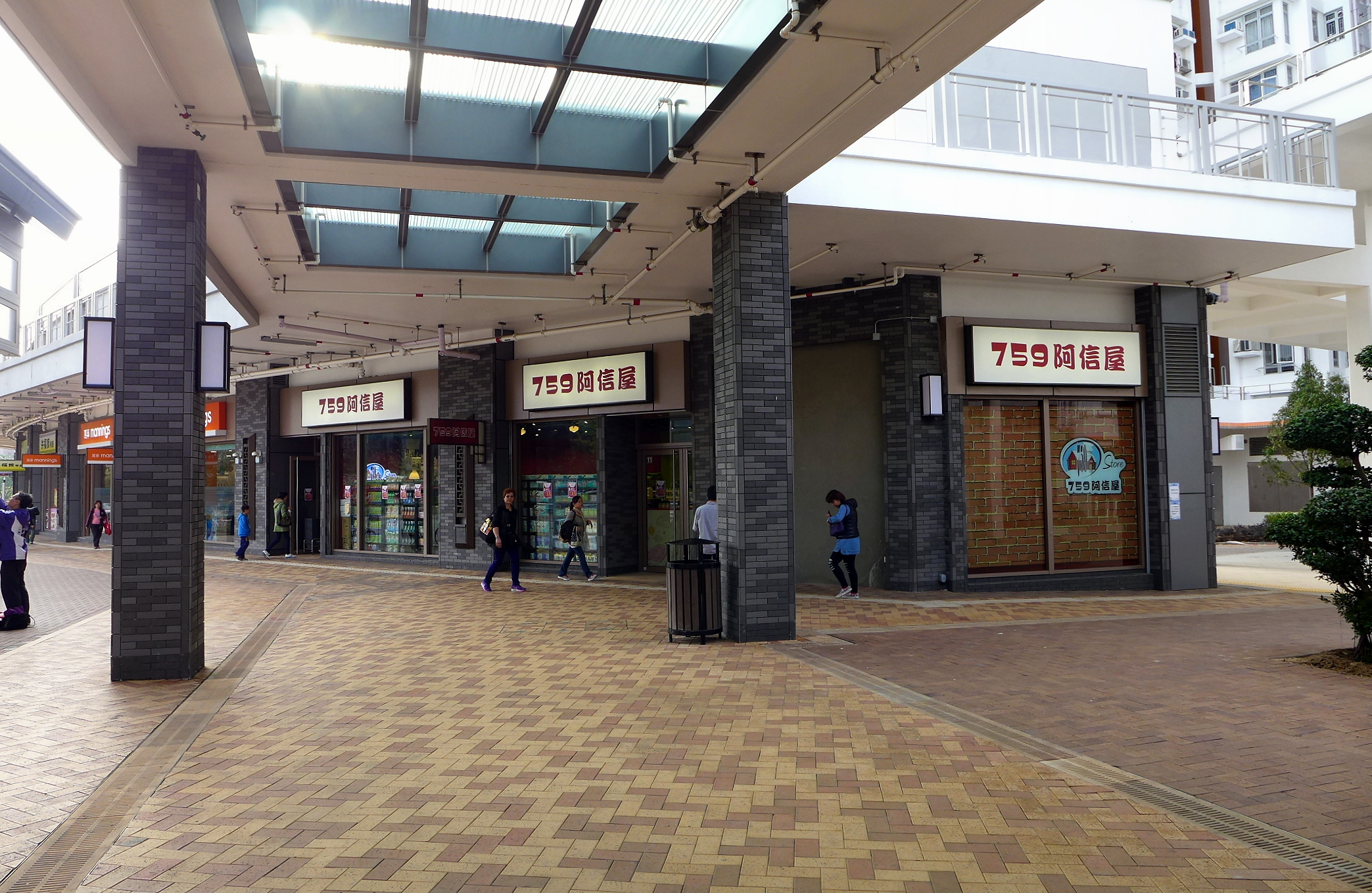 Hung Fuk Estate